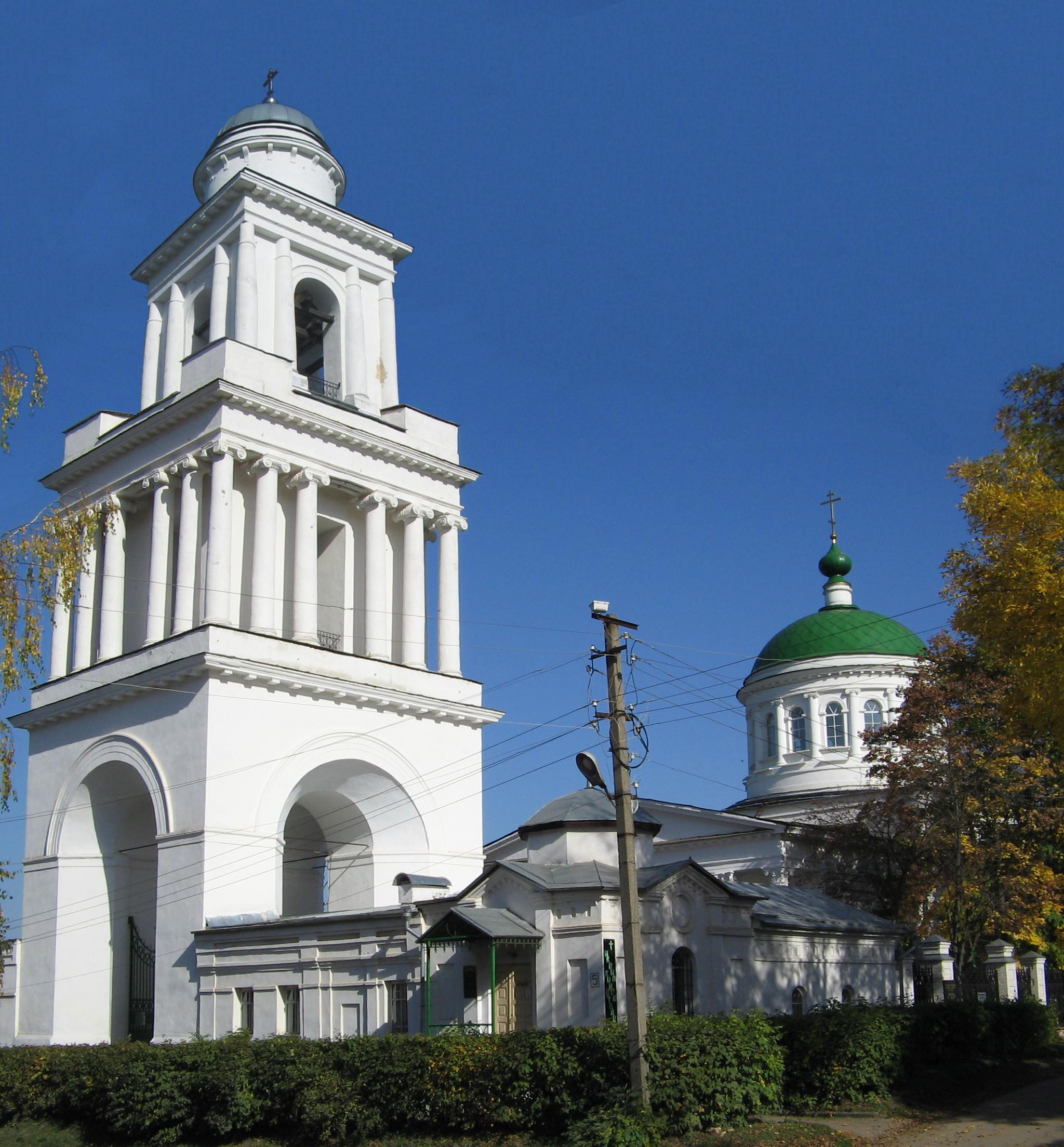 Церковь иконы Оковецкой Божией матери (г.Ржев)